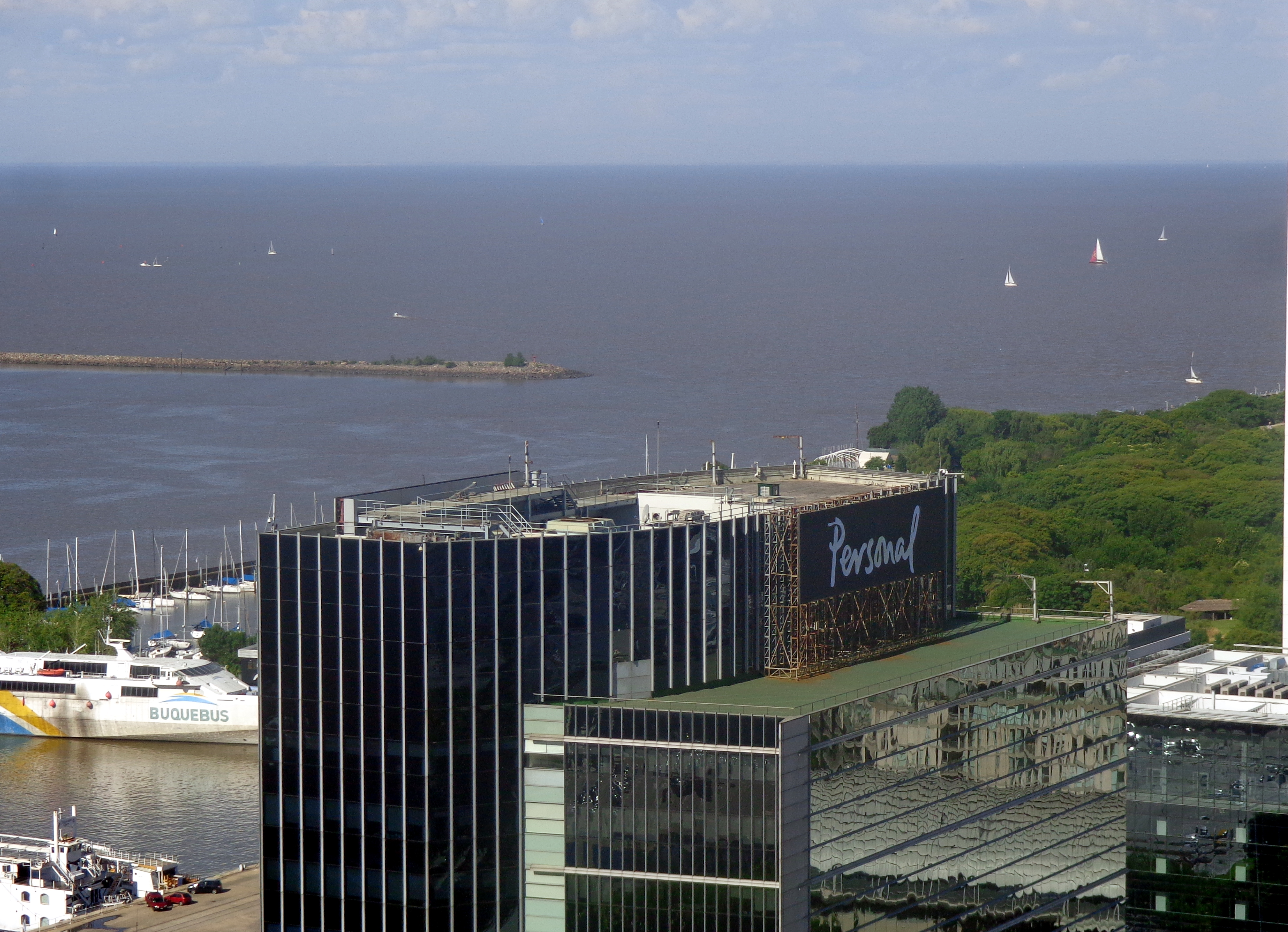 Edificio Telecom, Buquebus, Puerto Nuevo, Buenos Aires